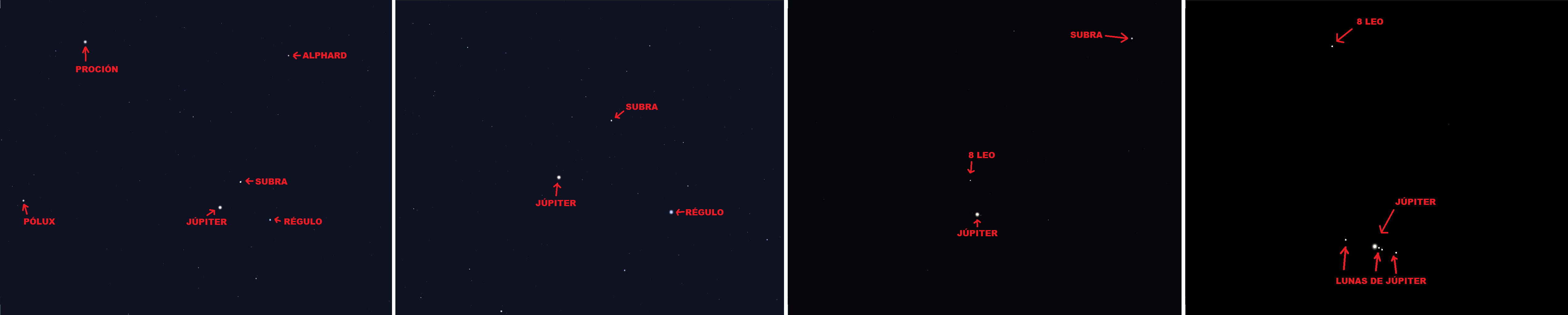 Vista de los astros desde diferentes instrumentos.